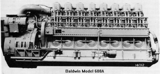 Motor Baldwin 608A (Diesel Engine)